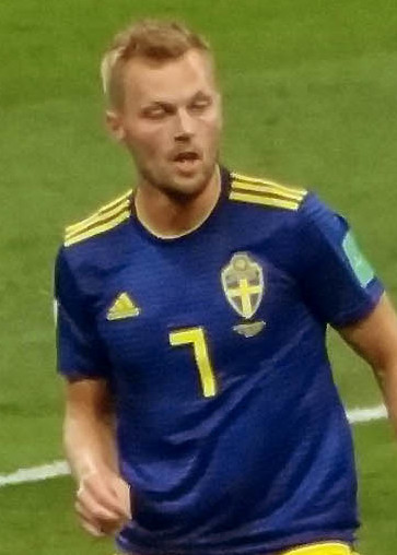 23 июня 2018 года на ЧМ-2018 сборная Германии выиграла на стадионе «Фишт» Швецию со счётом 2:1.